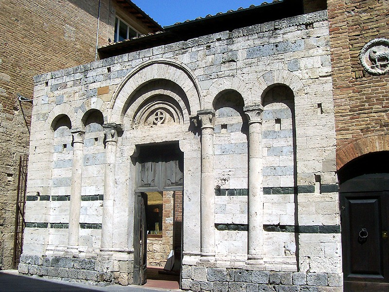 San Gimignano - Ex Chiesa di S. Francesco